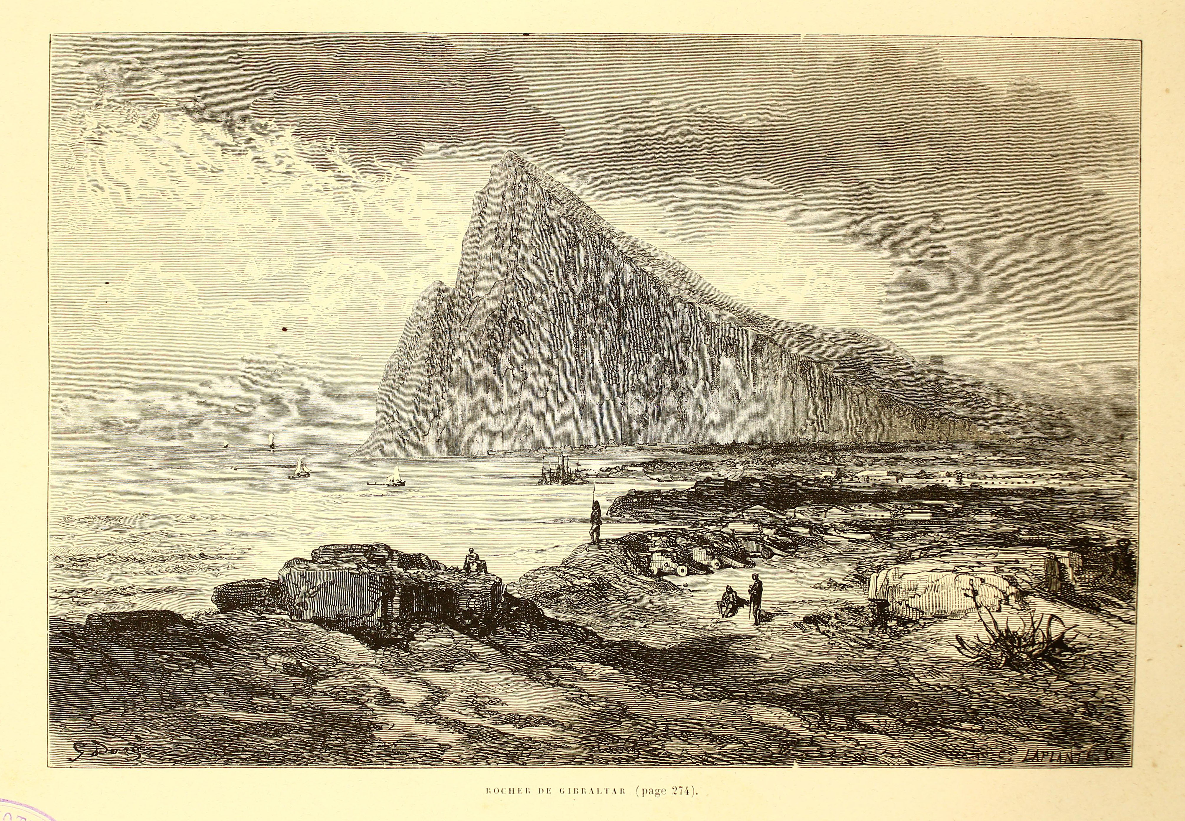 Autor: Davillier, Jean Charles, barón, 1823-1883 Descripción bibliográfica: L'Espagne / par Le Baron CH. Davillier ; ilustrée de 309 gravures dessinées su bois par Gustave Doré. - Paris : Librairie Hachette, 1874. - 799 p. : il. Materia: España- Geografía Materia: España- Usos y costumbres Ilustrador: Doré, Gustave, 1832-1883 Editor: Libreria Hachette Lugar de impresión: Francia, París Localización: Libro completo